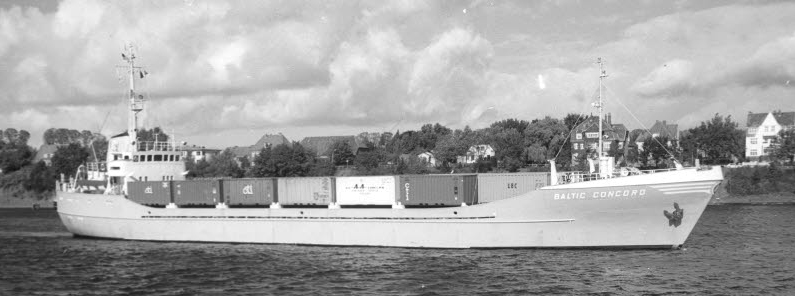 Zum Transport von Containern geeigneter Mehrzweckfrachter (Container-Feeder Typ 58 der Hamburger Sietas-Werft), gebaut für die Reederei Johann Kahrs (Stade), im Nord-Ostsee-Kanal vor Holtenau.